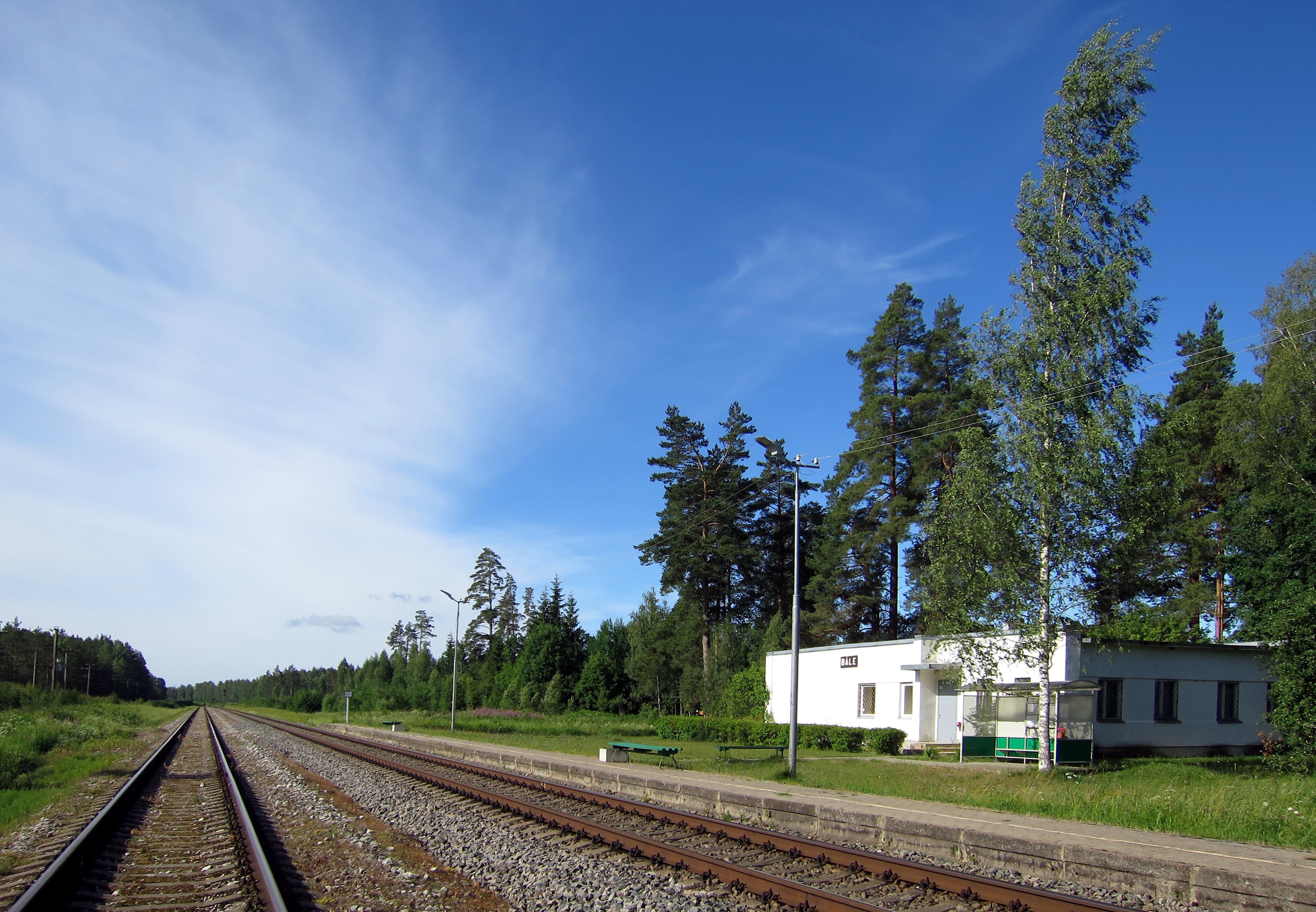 Kopskats Rīgas virzienā, perons pa labi